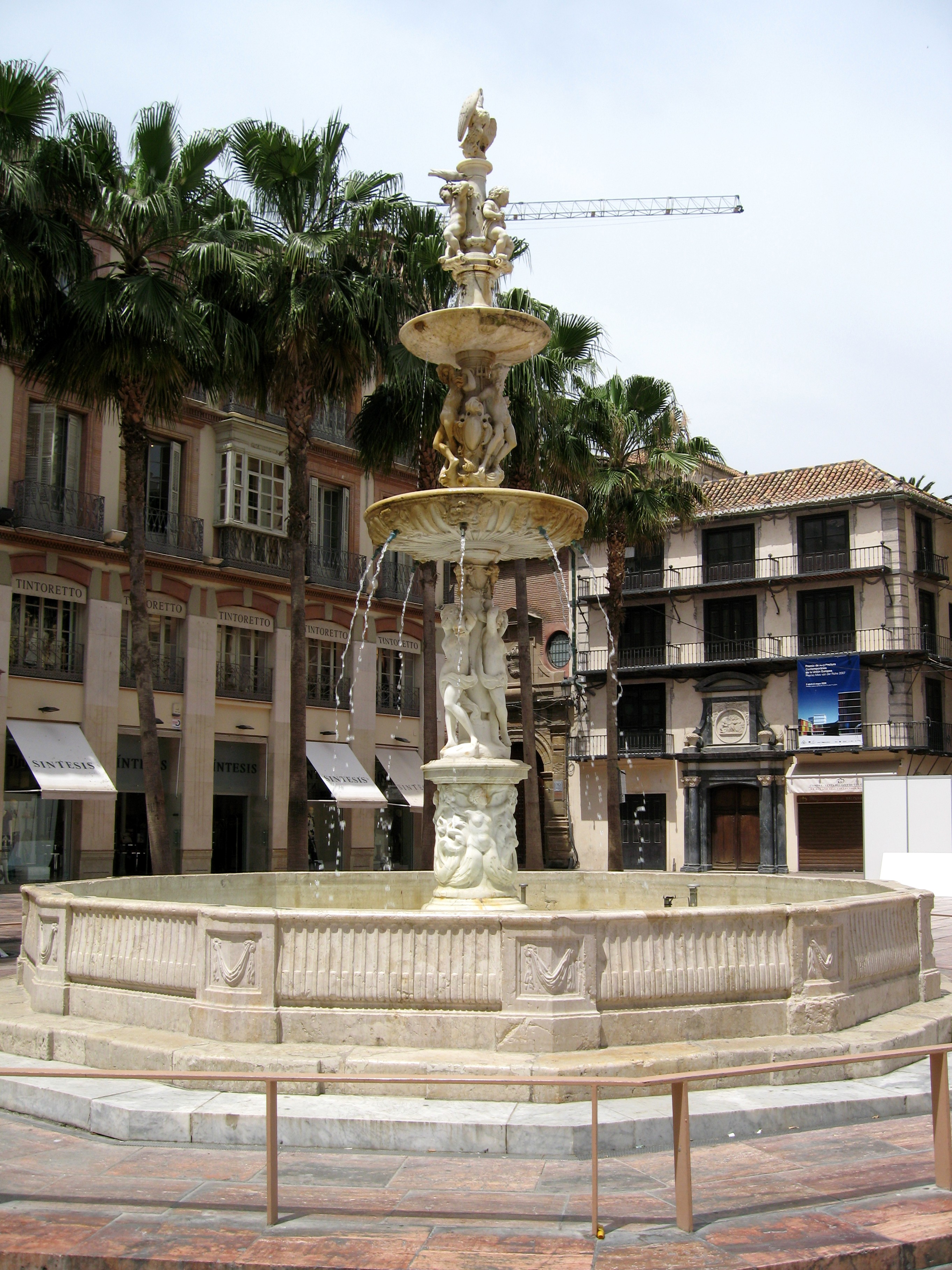 Brunnen auf der Plaza de la Constitución in der Altstadt von Málaga, Andalusien, Spanien